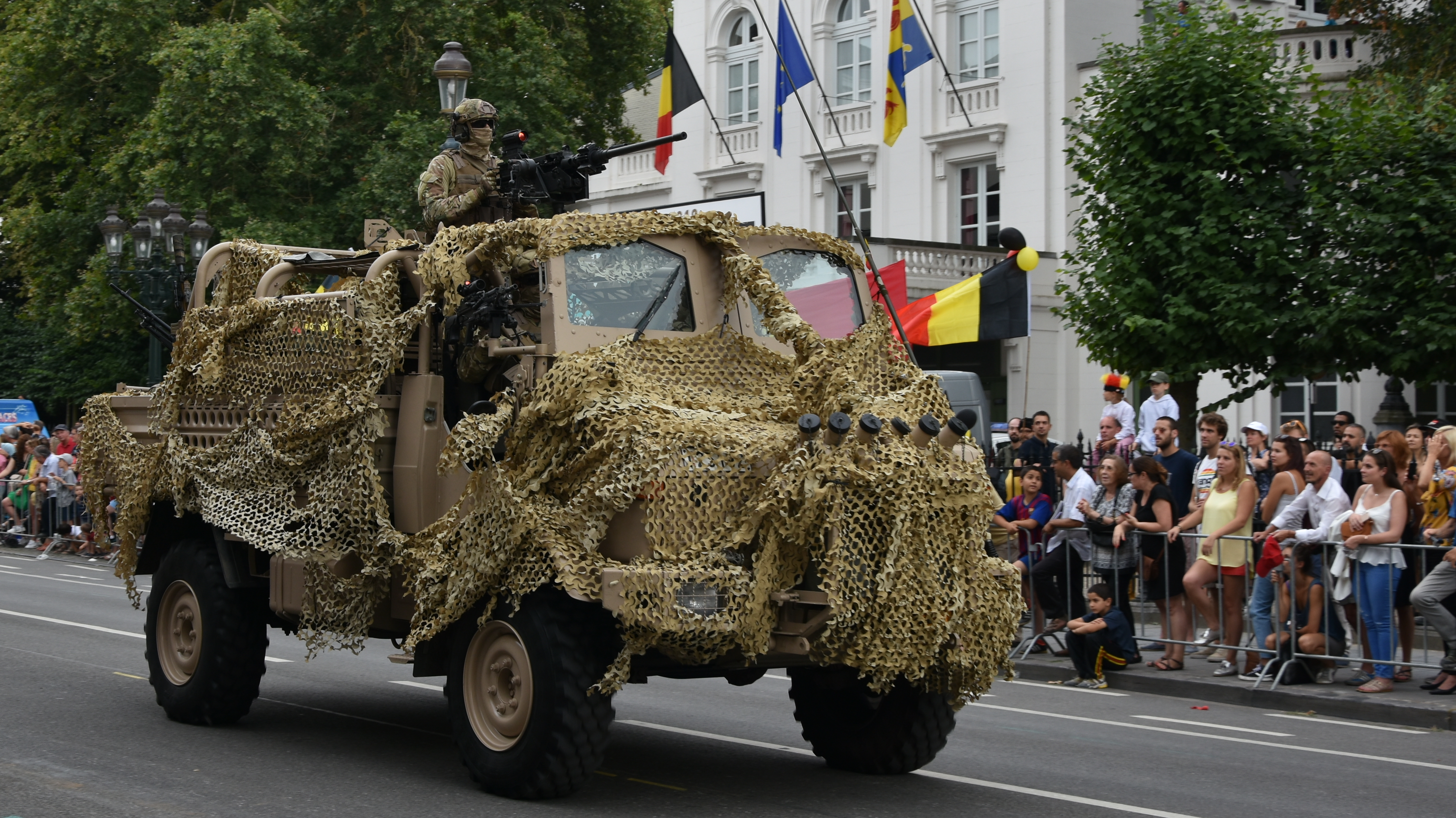 Unimog 1,9T 4x4 Jacam - Nationaal defilé 2018 This photo of immaterial heritage has been taken in the Brussels Capital Region